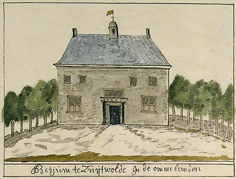 De borg Beyum bij het Groningse dorp Zuidwolde. Tekening (ca. 1731) uit de atlas van Andries Schoemaker.